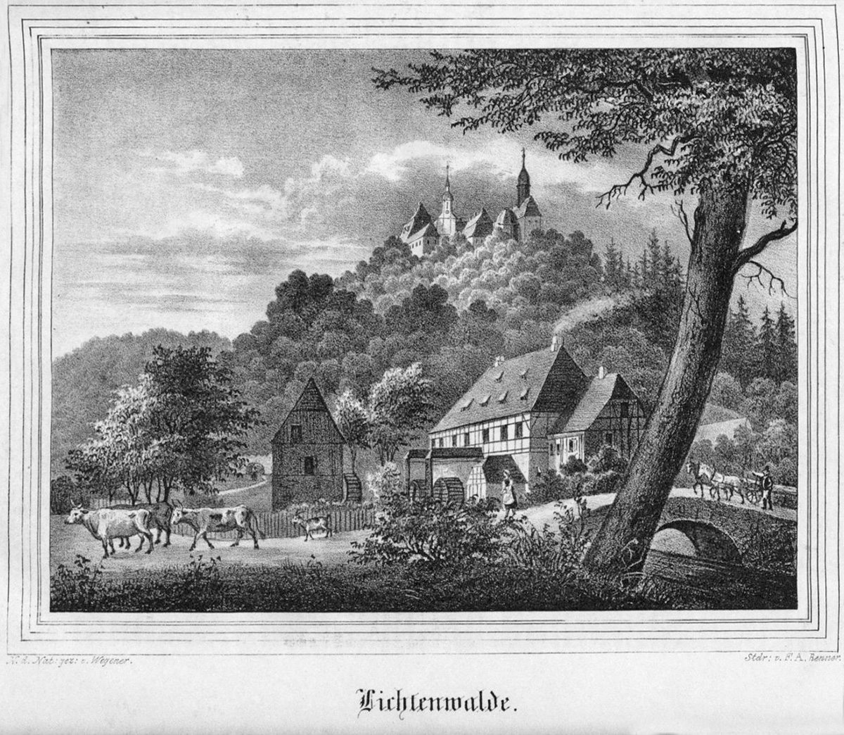 Schloss Lichtenwalde vom Zschopautal aus, um 1840